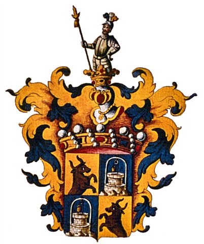 Die Ritter Putz von Rolsberg werden in den Freiherrenstand erhoben am 30.12.1734 durch Kaiser Karl VI. (ung. Baronat und Indigenat) sowie zusätzlich für Böhmen u. die österr. Länder am 3.7.1781 durch Kaiser Josef. II.